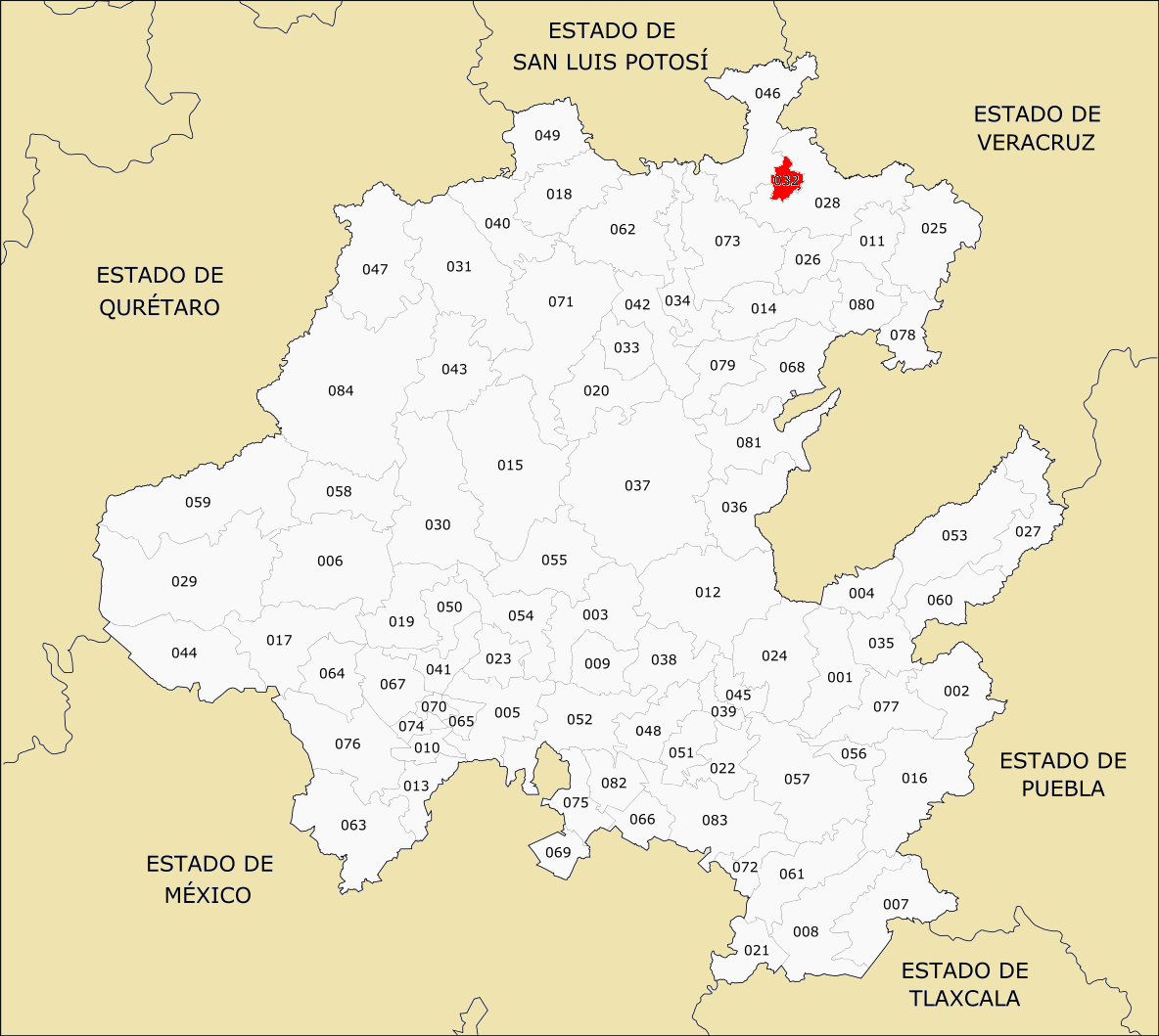 Municipios de Hidalgo